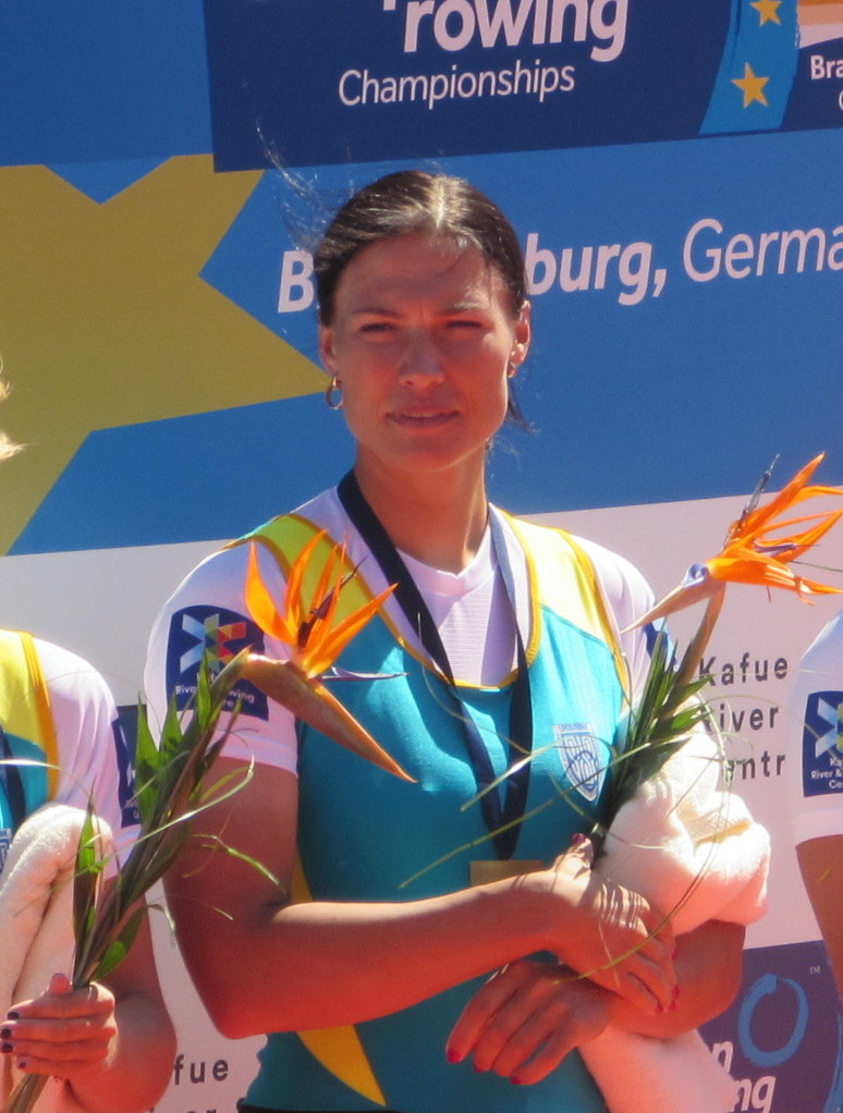 Darjna Verchogliad, Olena Burjak, Anastassija Koschenkowa, Jewgeniia Nimchenko, Ruder-EM 2016